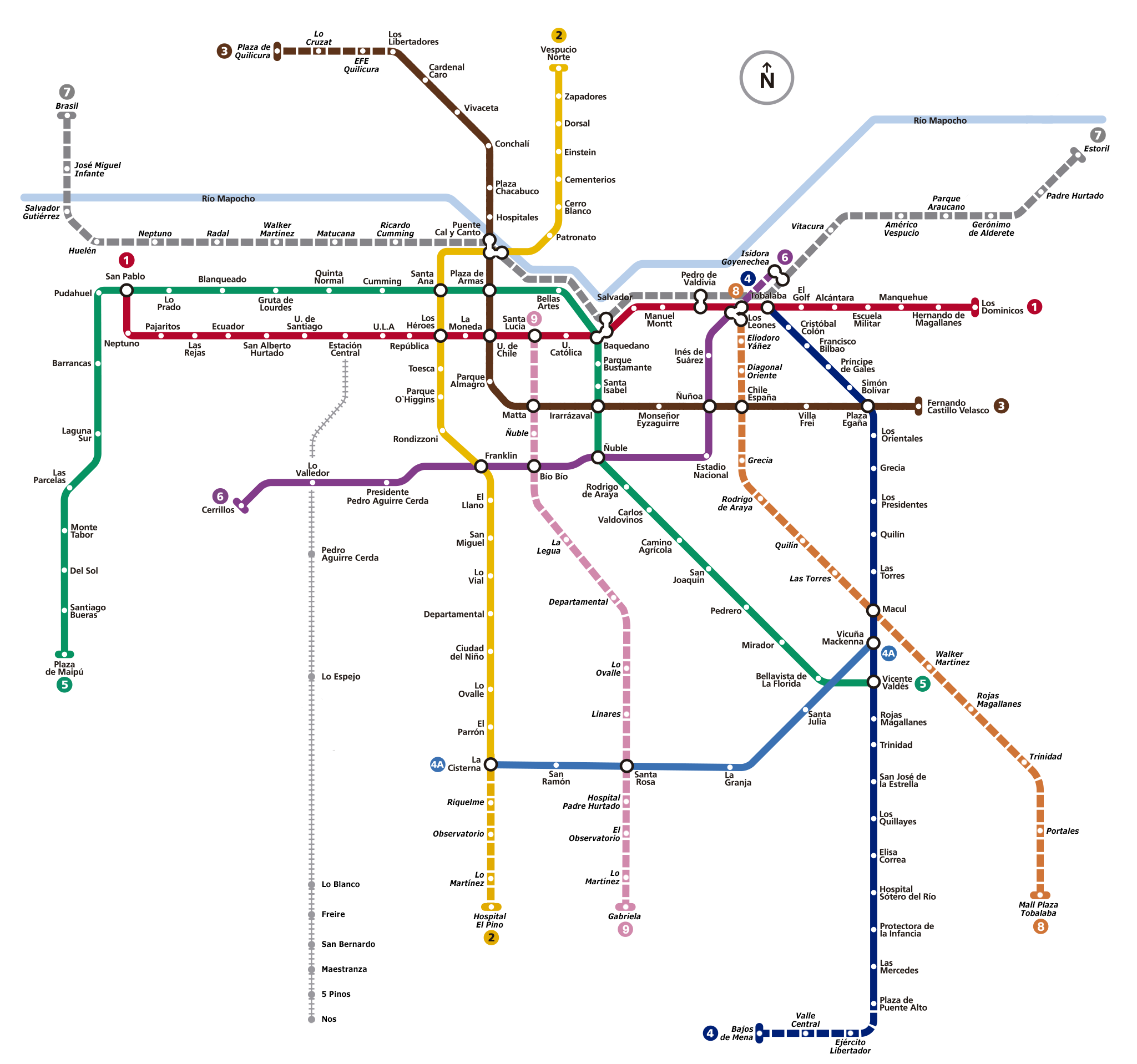 Mapa de la red del Metro de Santiago, proyectada hacia 2027 con las nuevas líneas 7, 8 y 9 y extensiones de las líneas 2, 3, 4 y 6